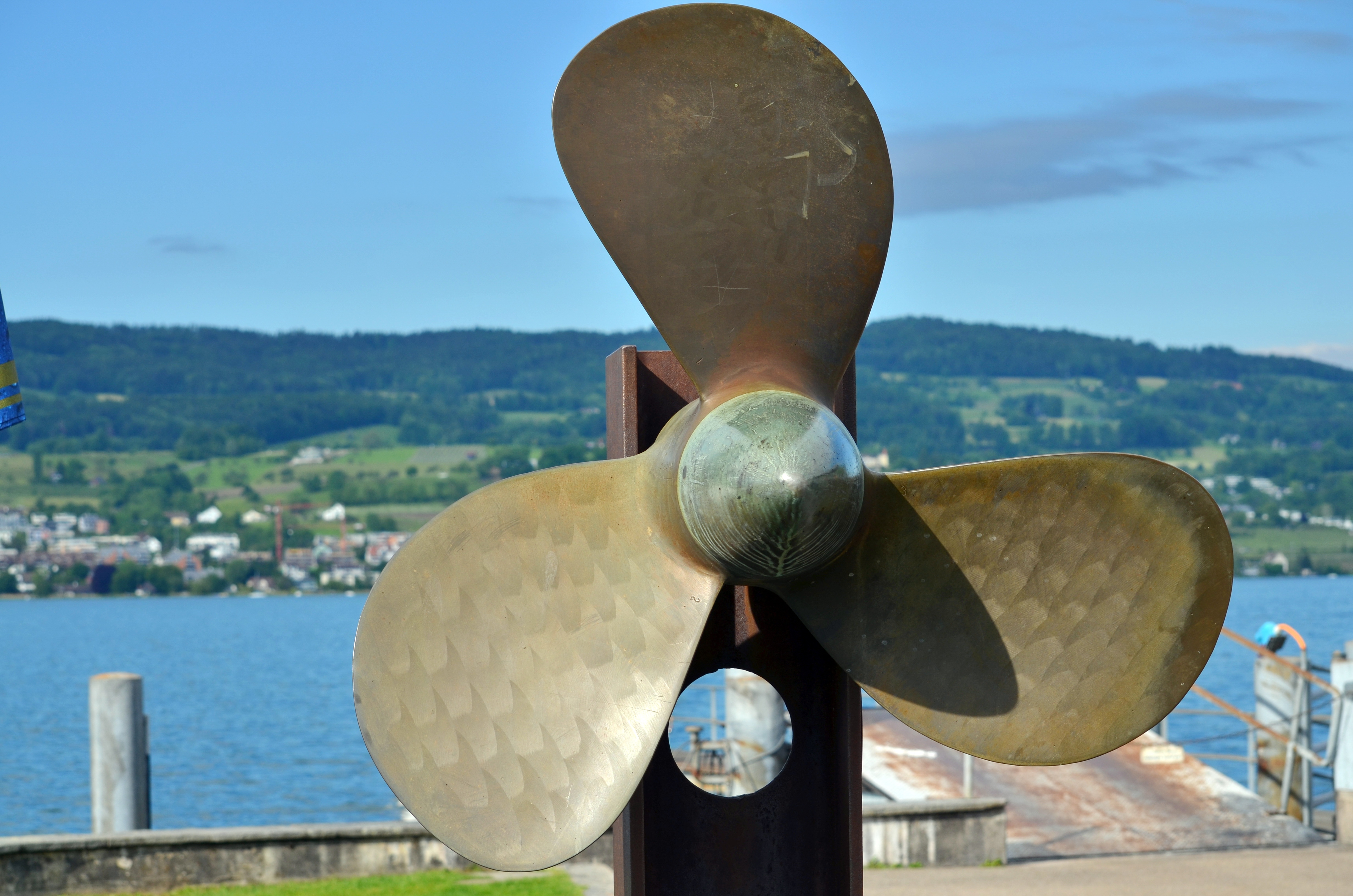 FS Schwan at Horgen ferryjetty on Zürichsee in Switzerland, Pfannenstiel in the background.